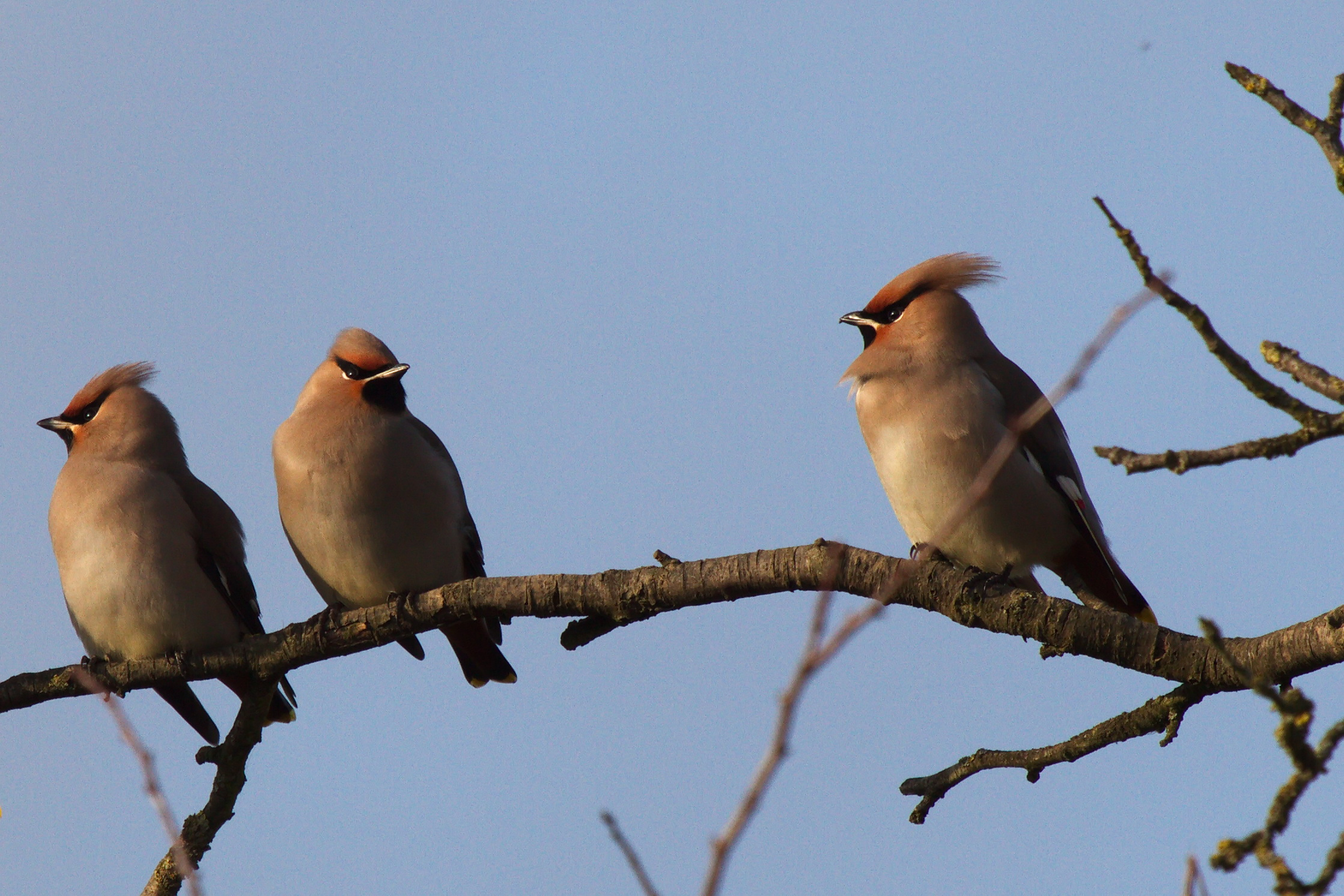 Seidenschwänze als seltene Wintergäste im November 2012 im Naturschutzgebiet Bislicher Insel in NRW, Deutschland. Nur alle paar Jahre kommt es zu größeren Einflügen dieser schönen Vögel.